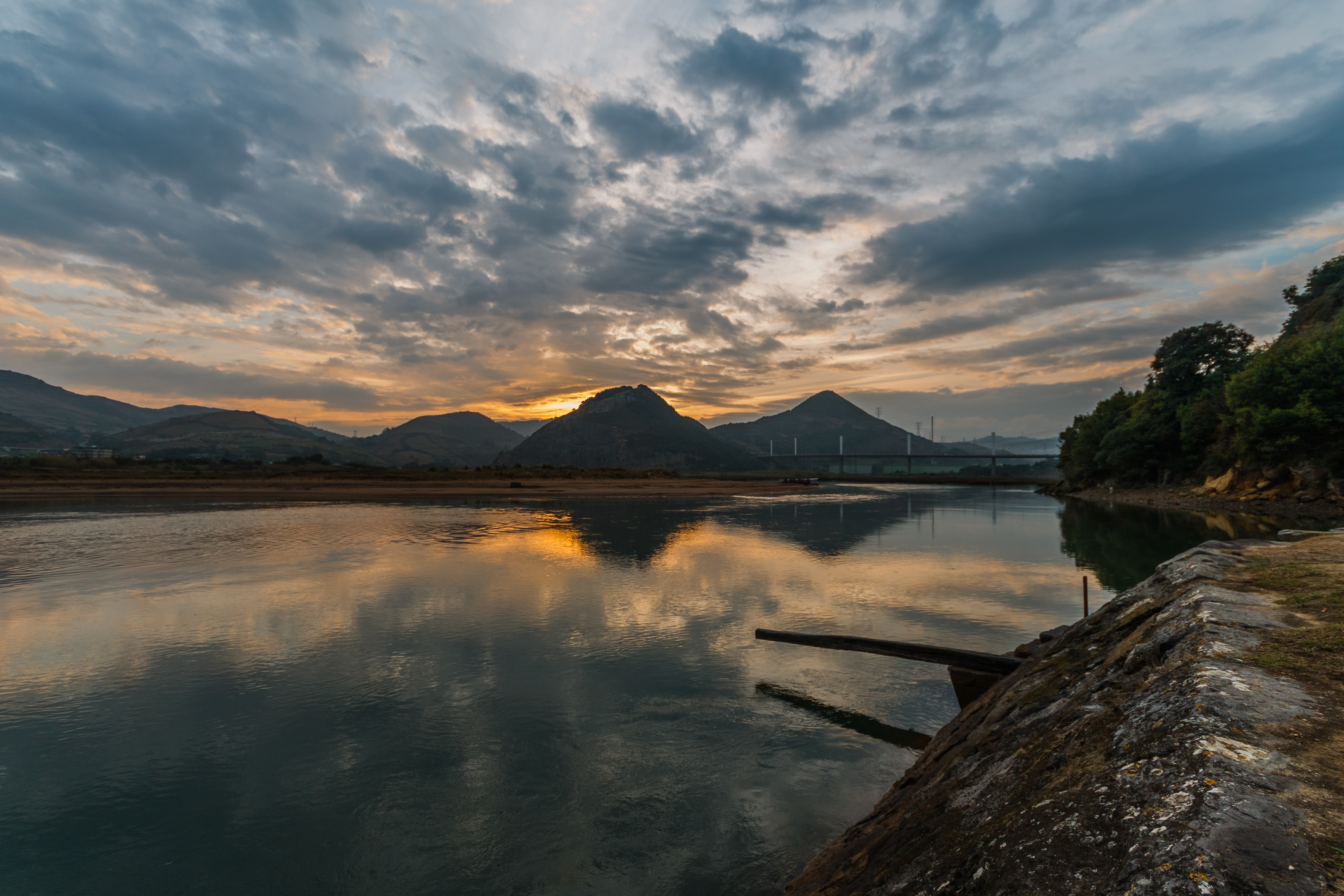 Barbadun